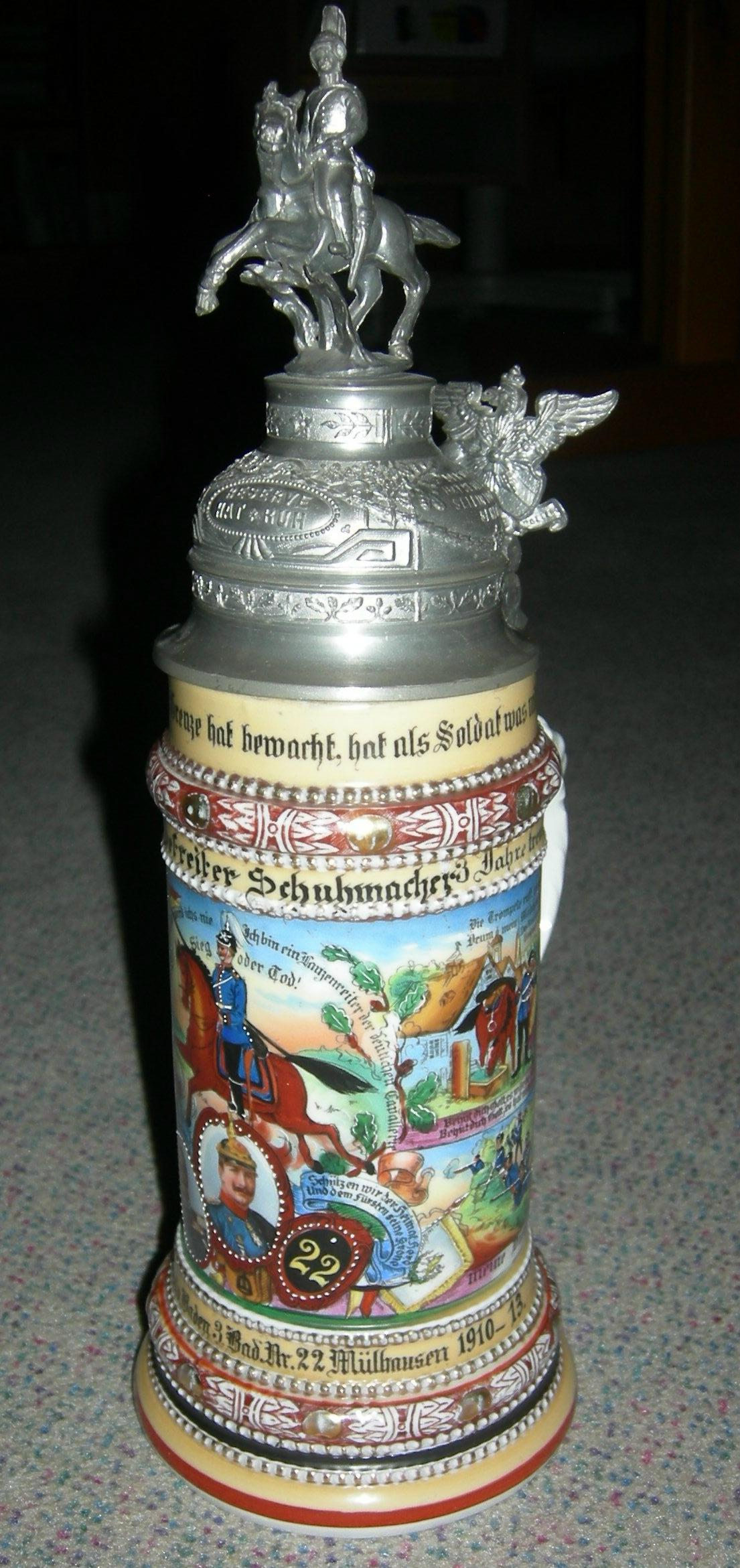 Reservistenkrug des Gefreiten Friedrich Schumacher, fehlerhaft mit h geschrieben